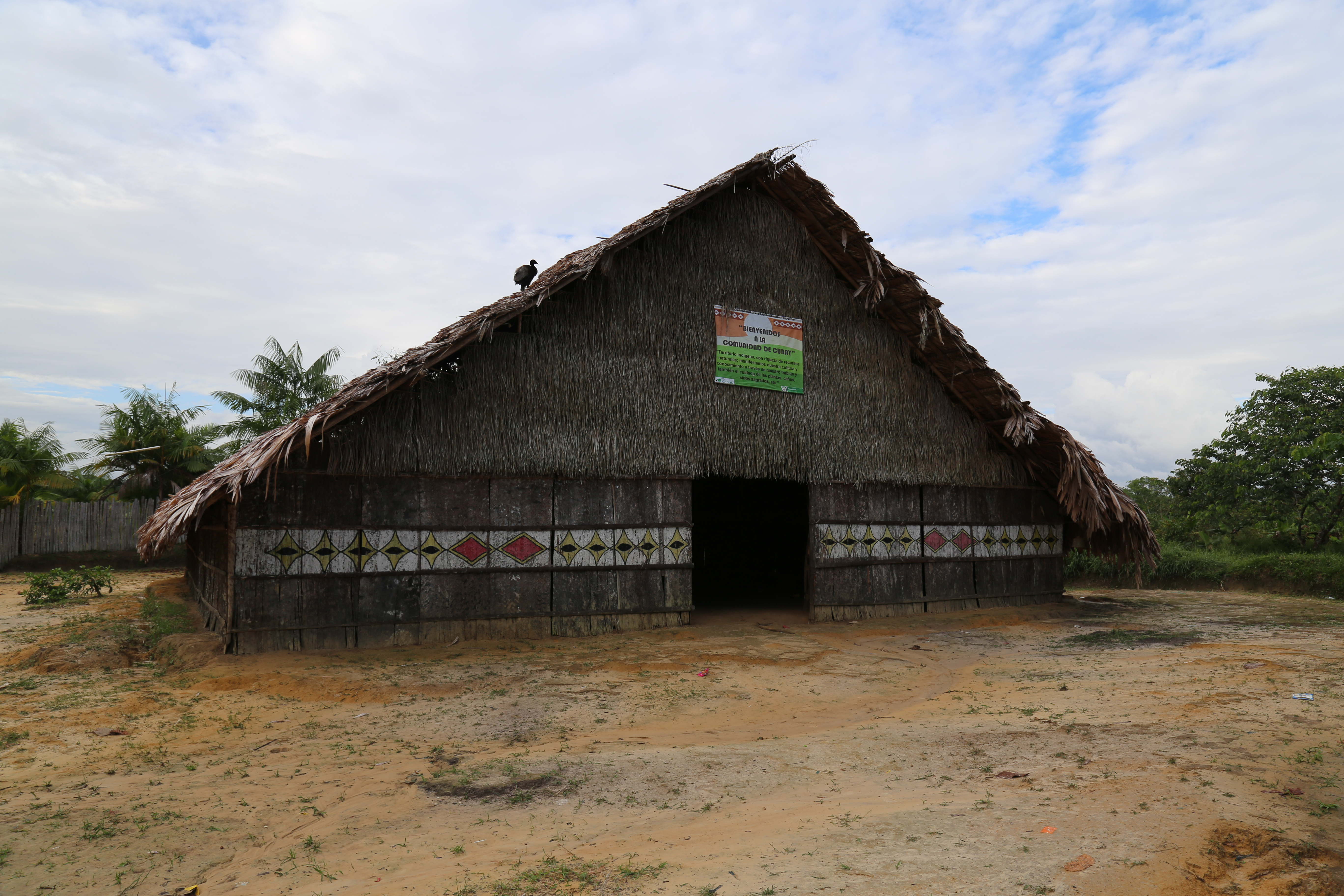 Maloca indígena Cubay